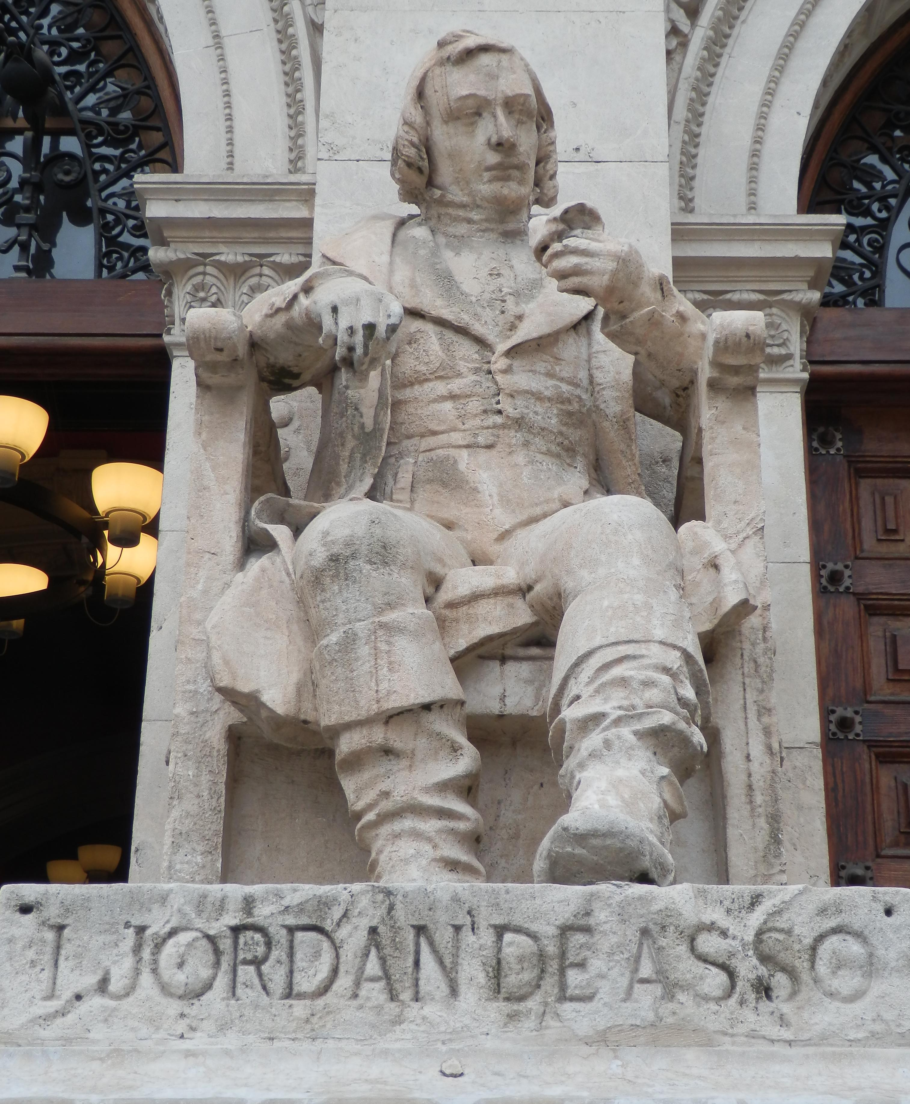 Estatua dedicada a Jordán de Asso en el Paraninfo de la Universidad de Zaragoza (Antigua Facultad de Medicina).